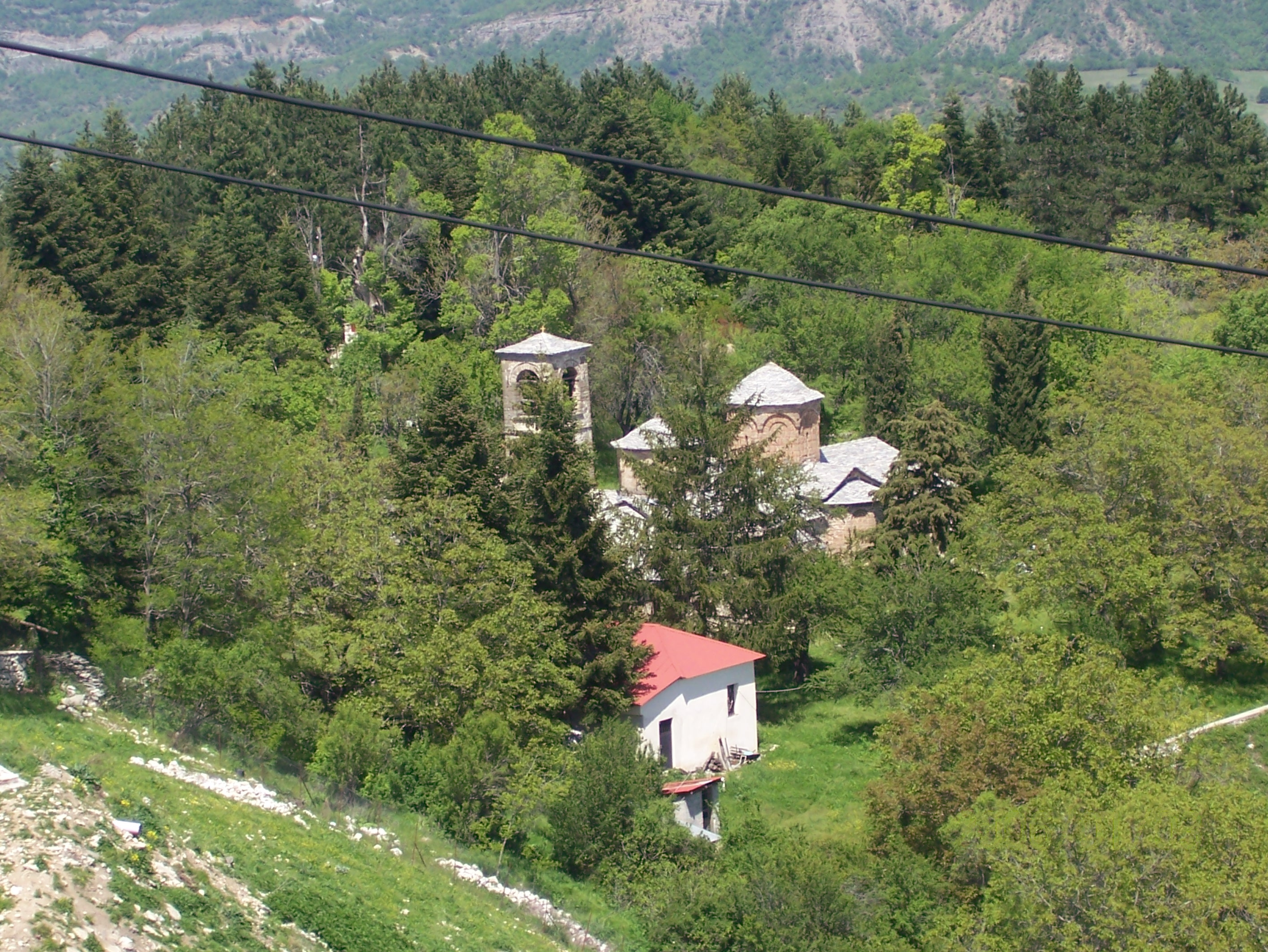 Църквата "Успение Богородично" в Спилео, Ном Гревена.